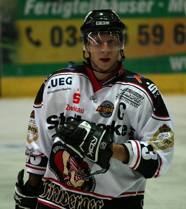 Torsten Heine im Trikot der Eispiraten Crimmitschau